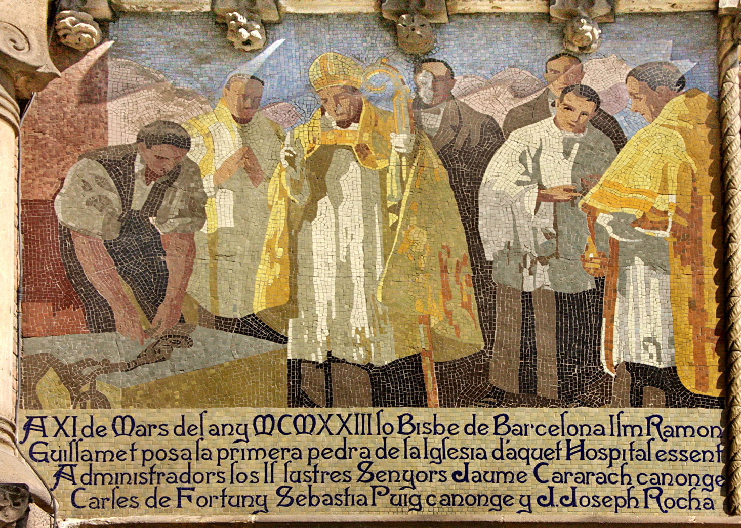 Darrer mosaic de la sèrie de plafons de l'Hospital de Sant Pau (Barcelona, Catalunya). És obra de Lluís Brú de 1923.